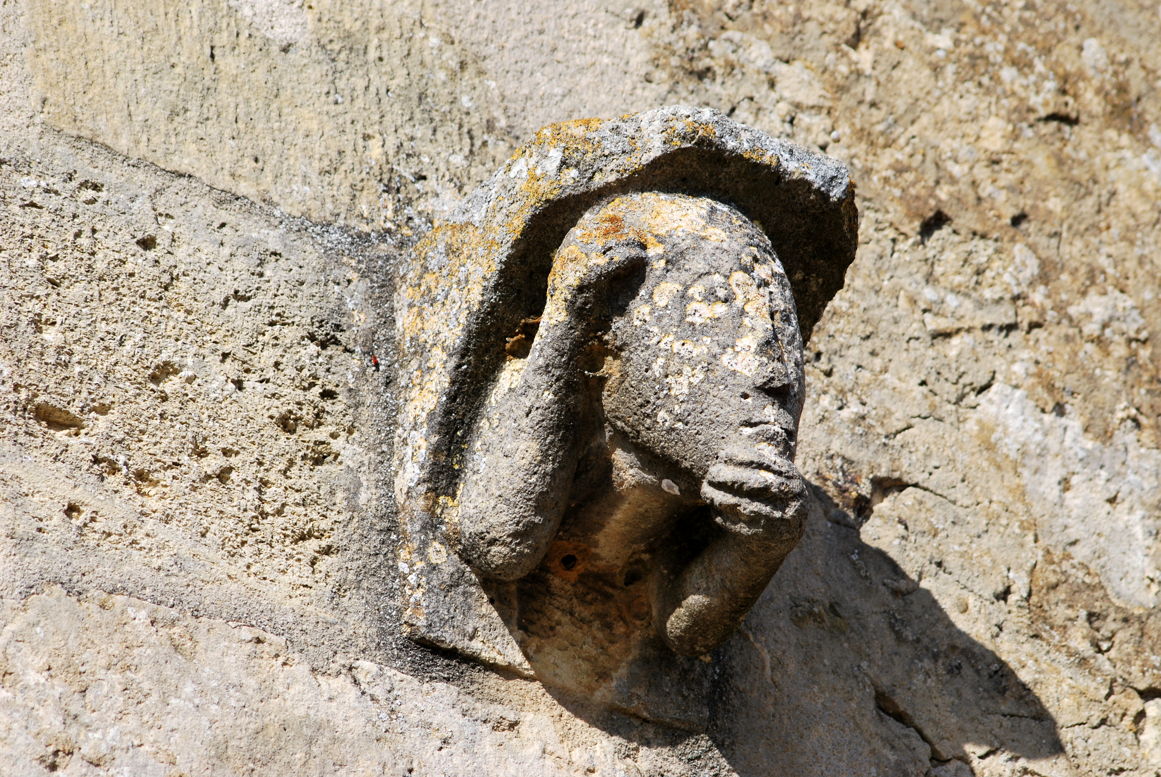 Modillons de l'église Saint-Jean-Baptiste de Monprimblanc